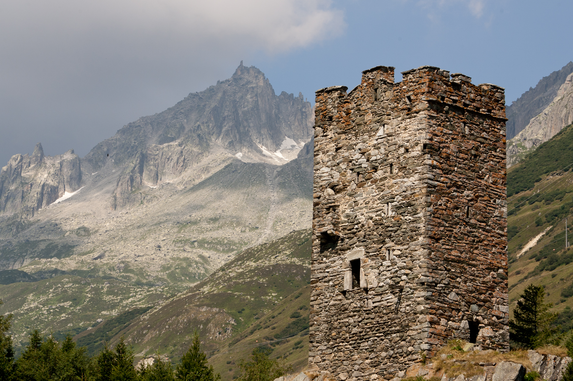 Langobardenturm in Hospental